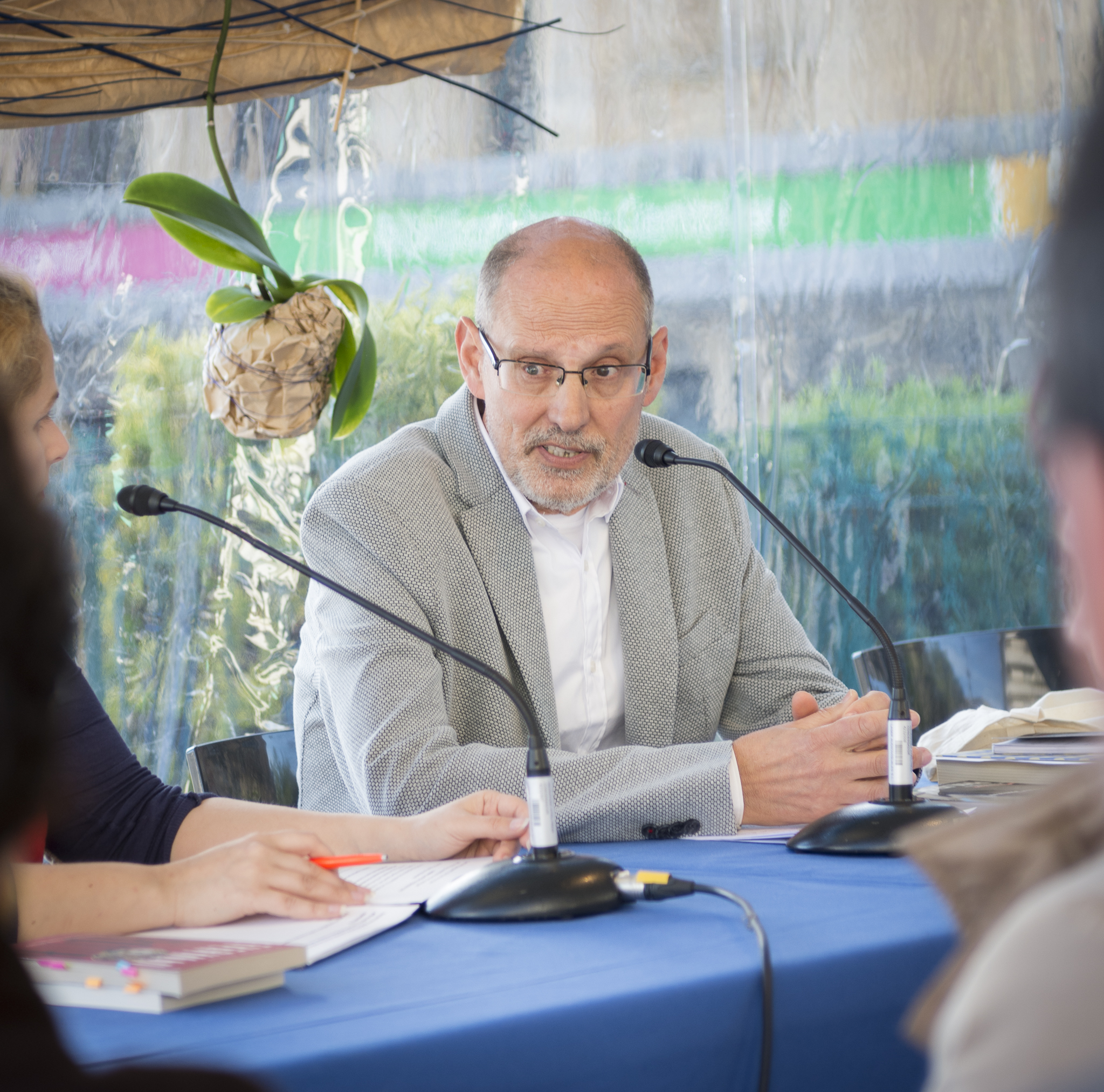 P. Rothen-en Everyman liburuaren inguruan solasaldia, ingelesez. Jordi Fibla, itzultzailea, eta Slawka Grawoska, moderatzailea.